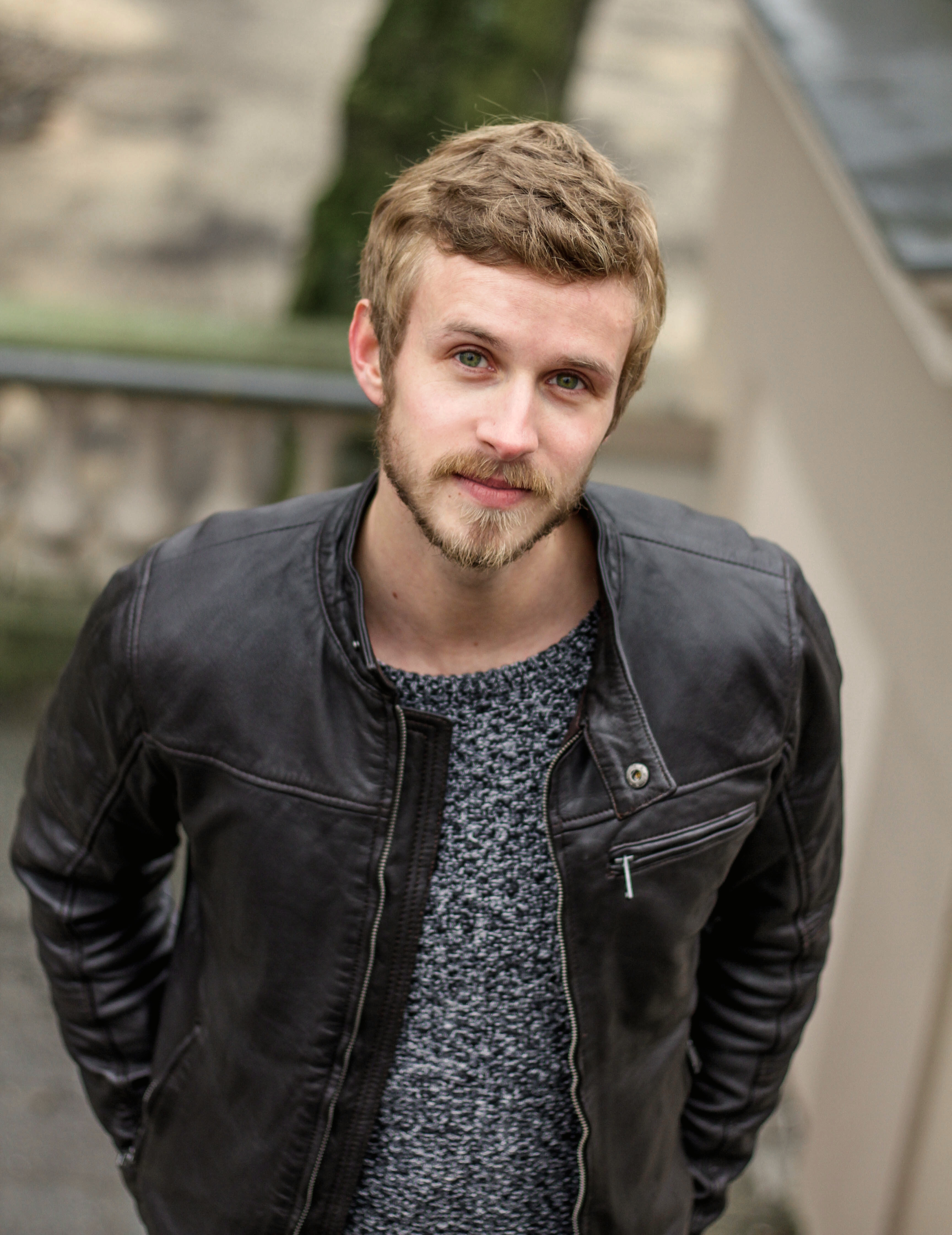 Schauspieler